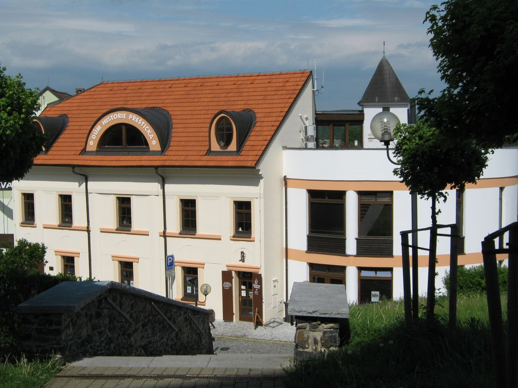 Budova přeštického městského muzea - Domu historie Přešticka